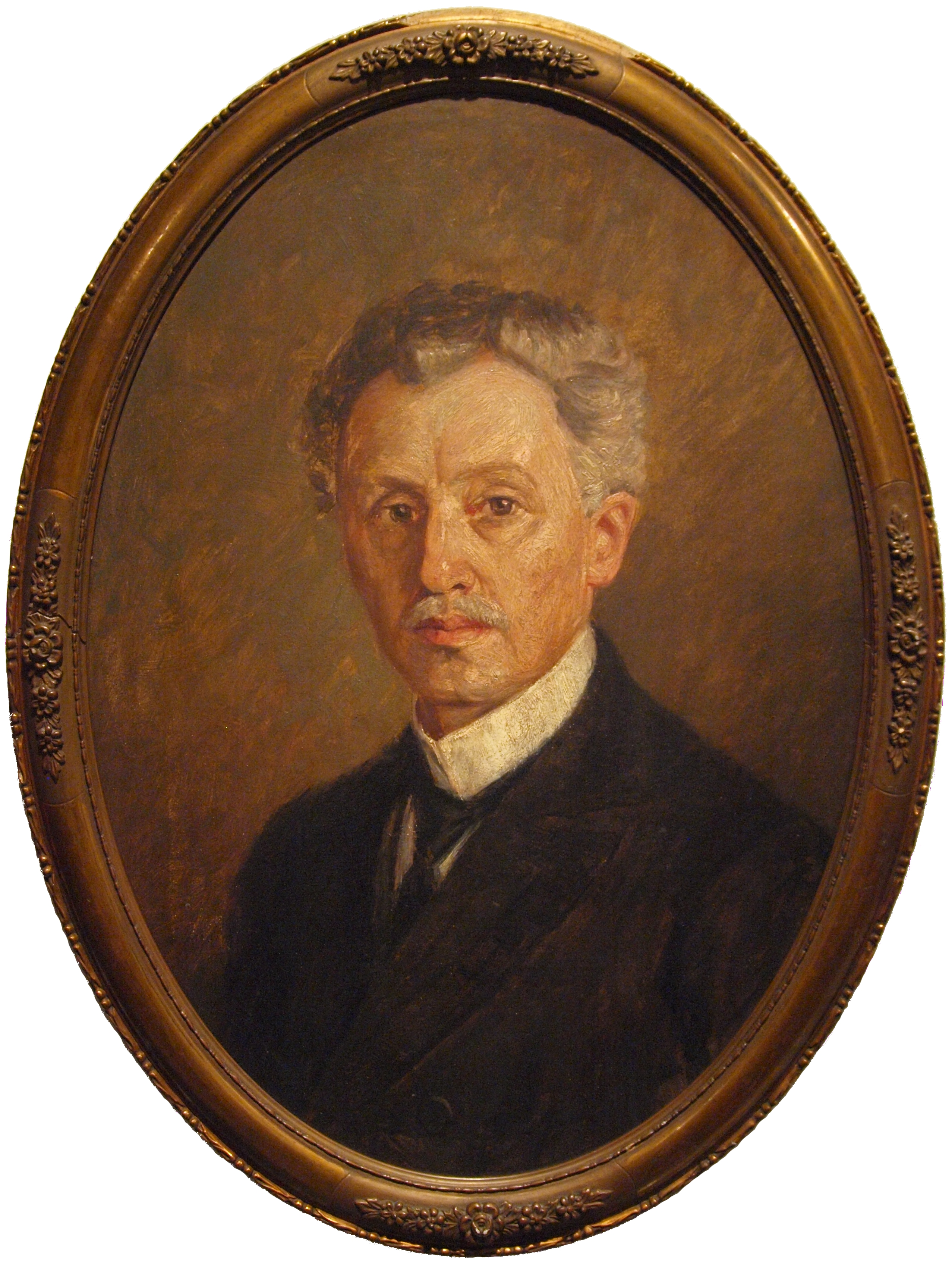 August Heinrich Christian Wilhelm Helms (* 20 April 1847 in Salzderhelden, Germany; † 22 June 1920 in Harburg, now Hamburg-Harburg, Germany), Senator, Merchant and founder of the Museumsverein für den Stadt- und Landkreis Harburg.